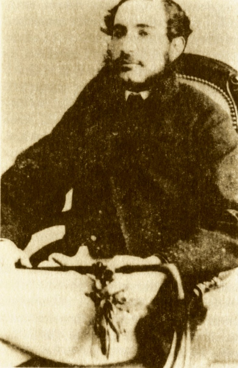 Alphonse de Toulouse-Lautrec jako mladý muž